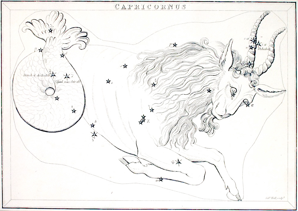 Zodiacal Constellation Capricornus